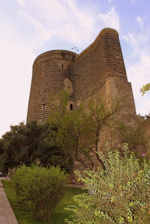 Девичья Башня. Баку, Азербайджан. Maiden Tower Baku, Azerbaijan